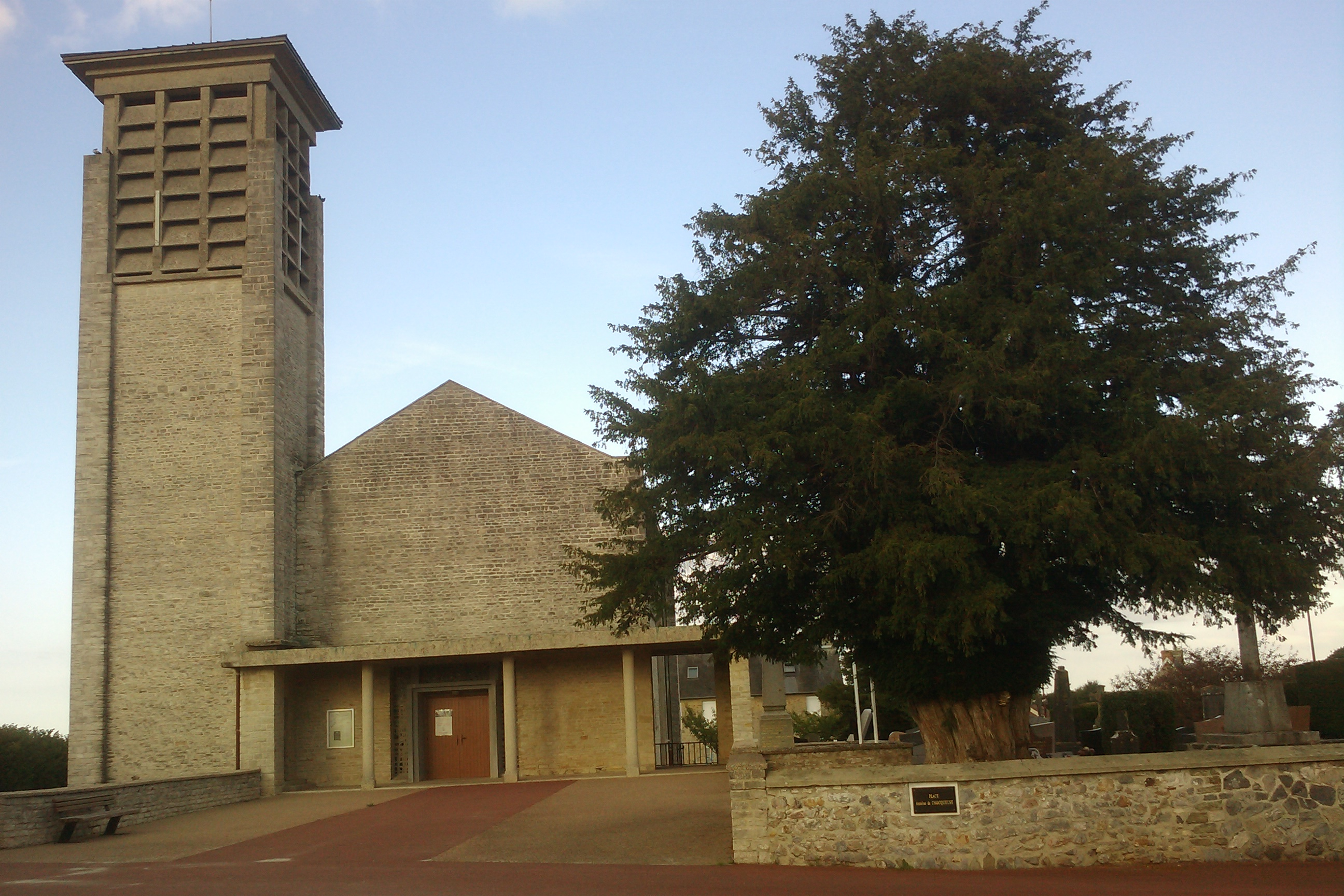 Église de Cavigny